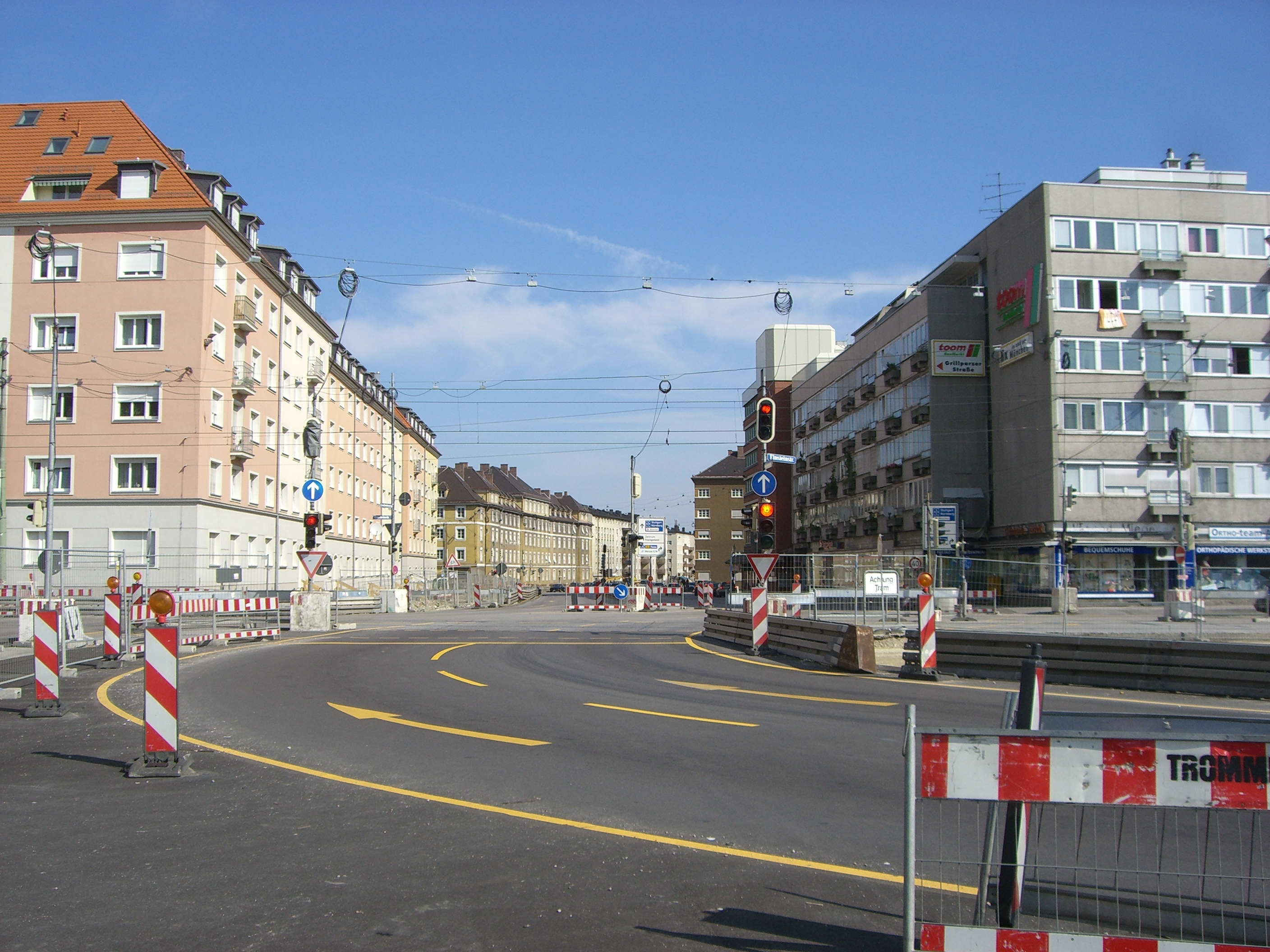 München - Mittlerer Ring - Leuchtenbergring.jpg